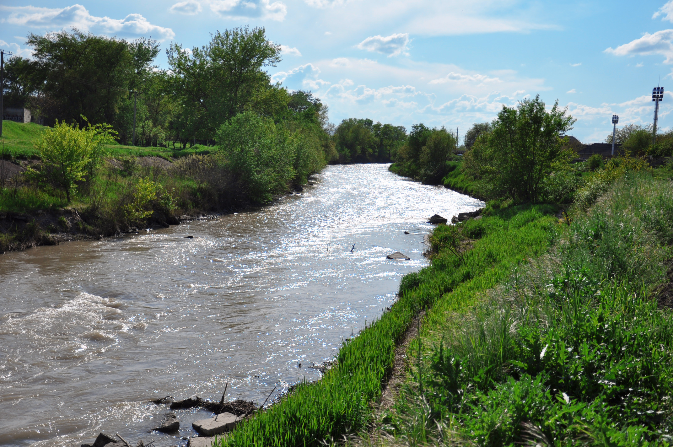 р. Малка в черте г. Прохладный (р-н городского парка)